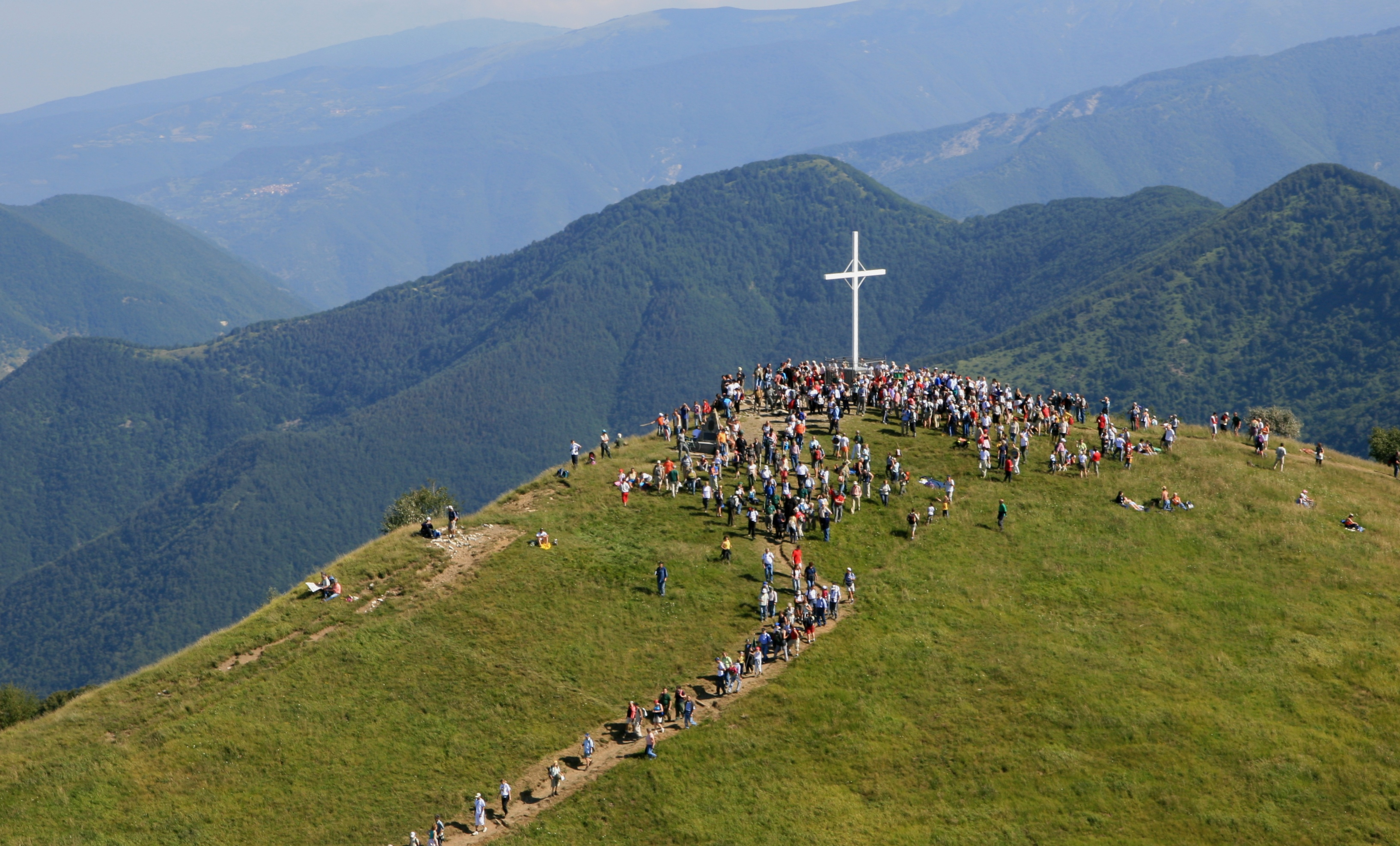 La croce di vetta